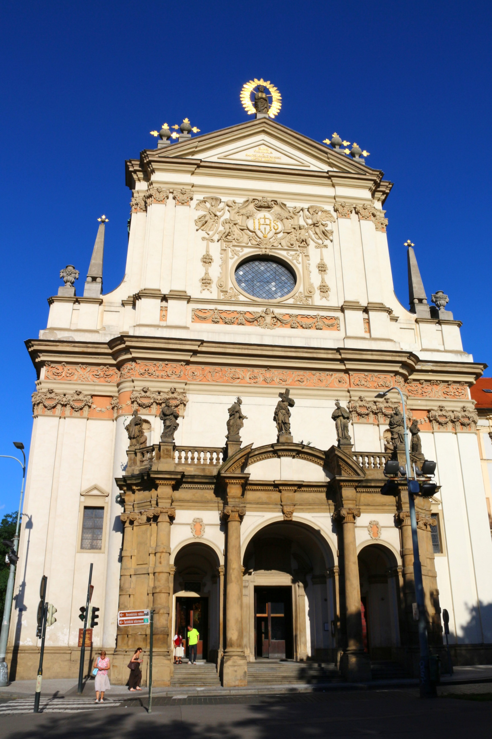 Kostel sv. Ignáce z Loyoly na Karlově náměstí